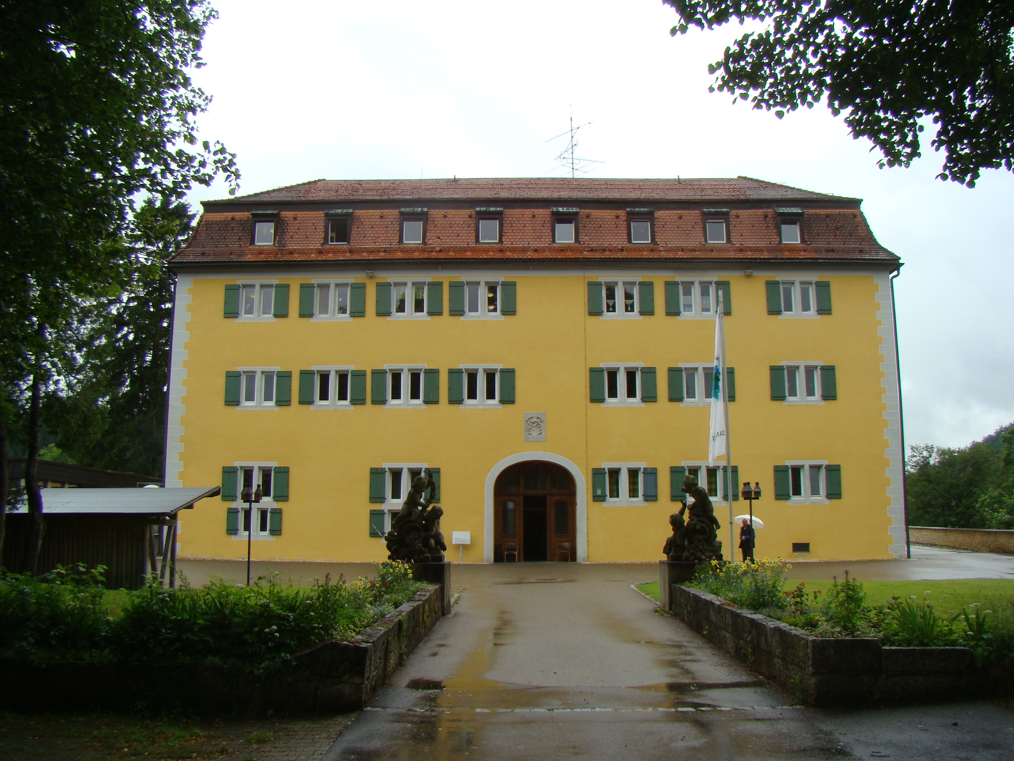 Schloss Grafeneck